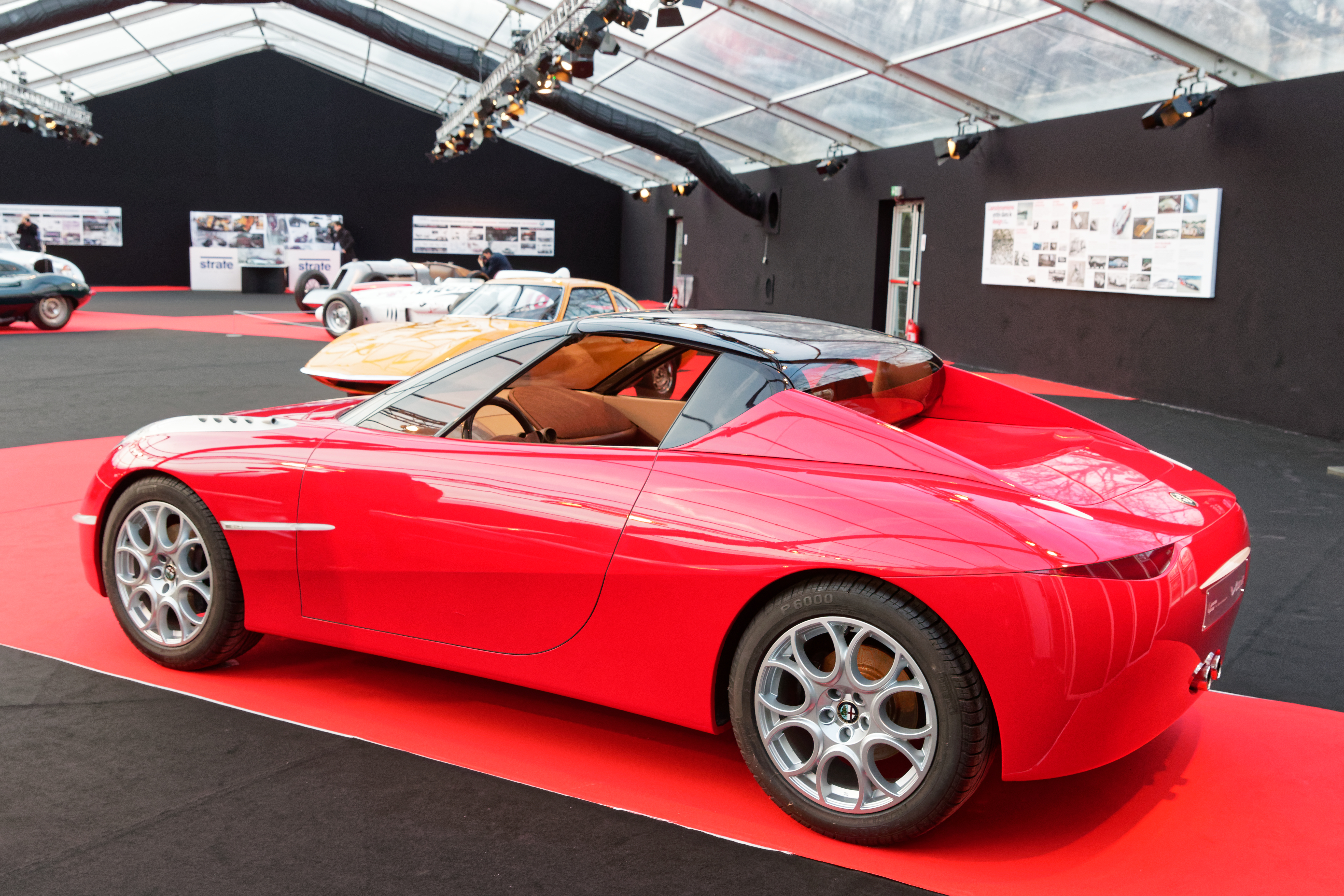 La Ferrari Fioravanti F100 Roadster exposée lors du festival automobile international 2016.